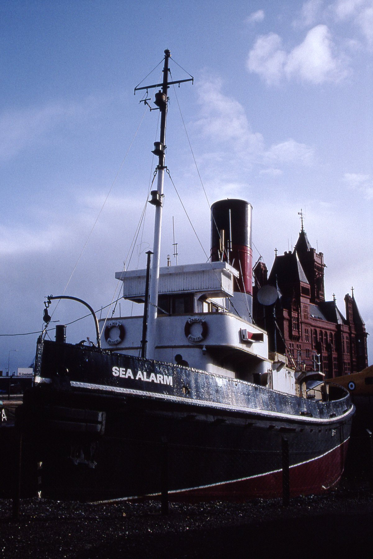 Scan from 35mm slide.